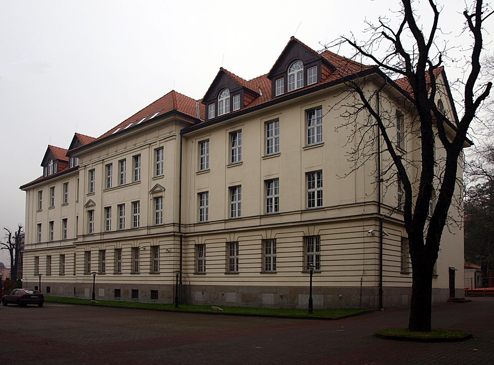 ulica Wolności. Przedsiębiorstwo Transportu Kolejowego